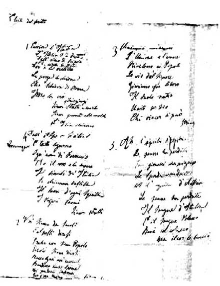 Canto nazionale: Canto degli italiani, Inno di Mameli, Inno nazionale italiano Prima stesura autografa di Goffredo Mameli. Fonte: Istituto Mazziniano di Genova – Italian National Anthem "Inno di Mameli".